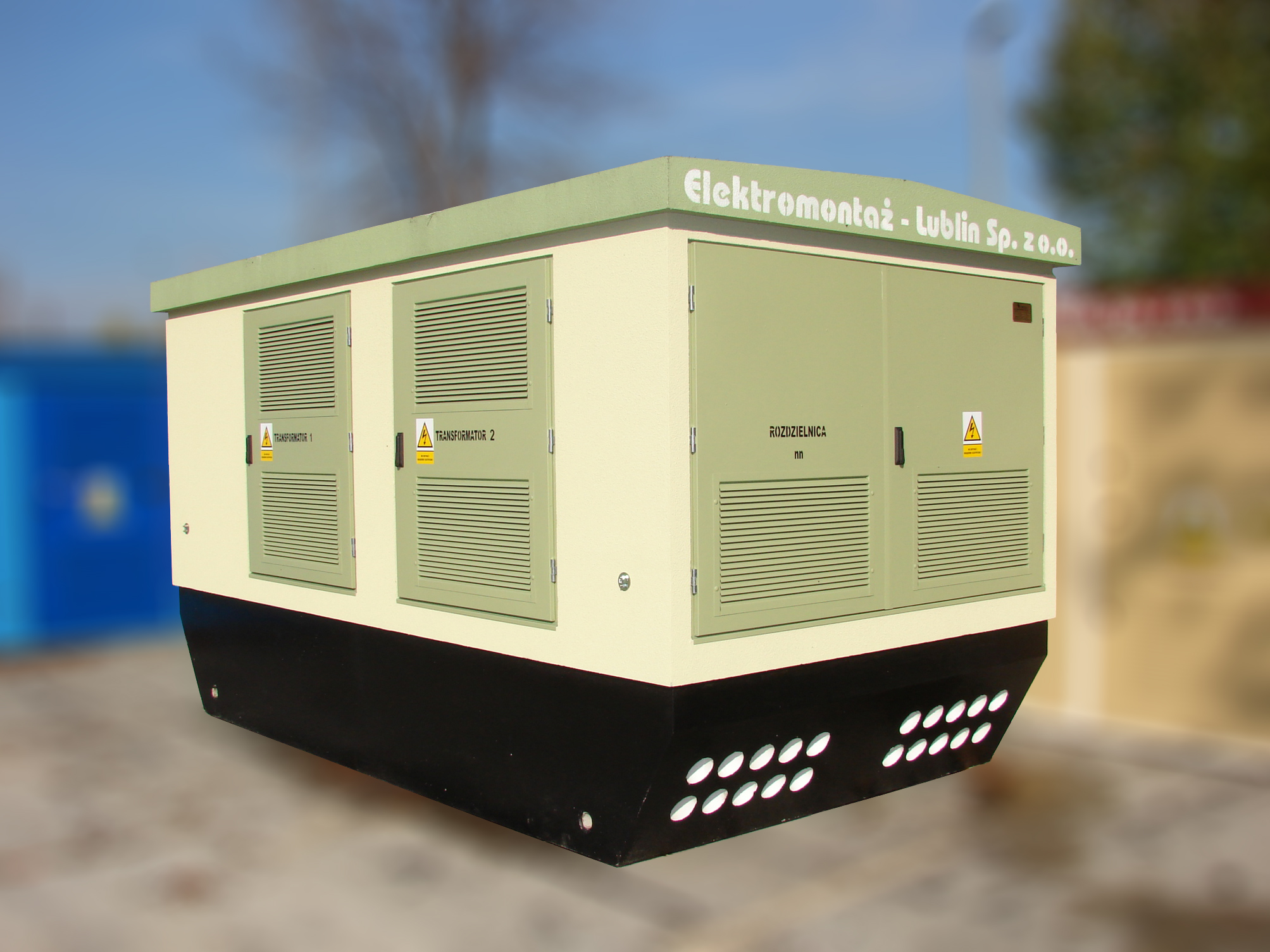 Stacja transformatorowa kontenerowa w obudowie betonowej z obsługą zewnętrzną - z dwoma transformatorami.